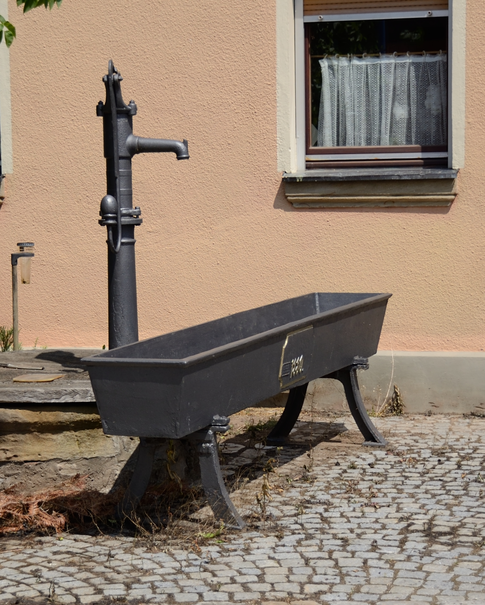 Brunnen, gusseiserner Pumpschwengel mit Eisenwanne, bezeichnet 1880; vor Haus Nr. 8 in Schlauersbach